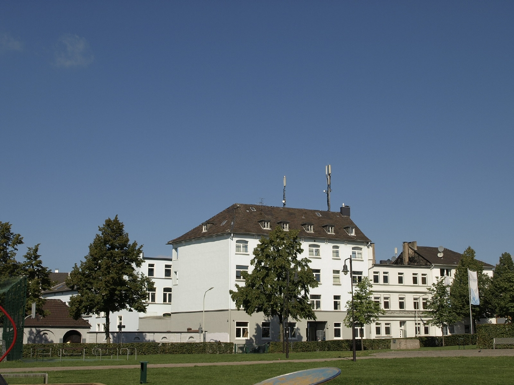 Geschäftsgebäude Platz der Republik 6+8. Wuppertal Quartier Ostersbaum. Ehem. Storchwerke jetzt Hauptsitz der Storch Ciret Holding, Produzent von Malererwerkzeugen. Auf der Denkmalliste der Stadt Wuppertal. kein Denkmal